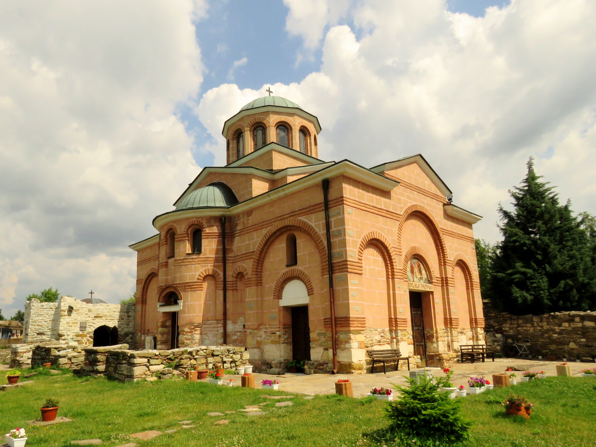 Манастирският комплекс „Св. Йоан Предтеча” е български православен манастир, разположен на десния бряг на река Арда в град Кърджали (квартал Веселчане). Той е бил част от средновековен епископски комплекс „Св. Йоан Продром”.